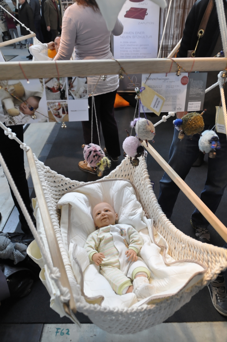 Messe Garten 2012 in Stuttgart Dieses Foto entstand durch Unterstützung des gemeinnützigen Vereins Skillshare.eu Skillshare e.V. ist ein eingetragener gemeinnütziger Verein zur Förderung der Bildung durch Unterstützung der Erstellung, Sammlung und Verbreitung so genannten freien Wissens. IBAN: DE16 8306 5408 0004 8850 66 BIC: GENODEF1SLR Bank: VR-Bank Altenburger Land